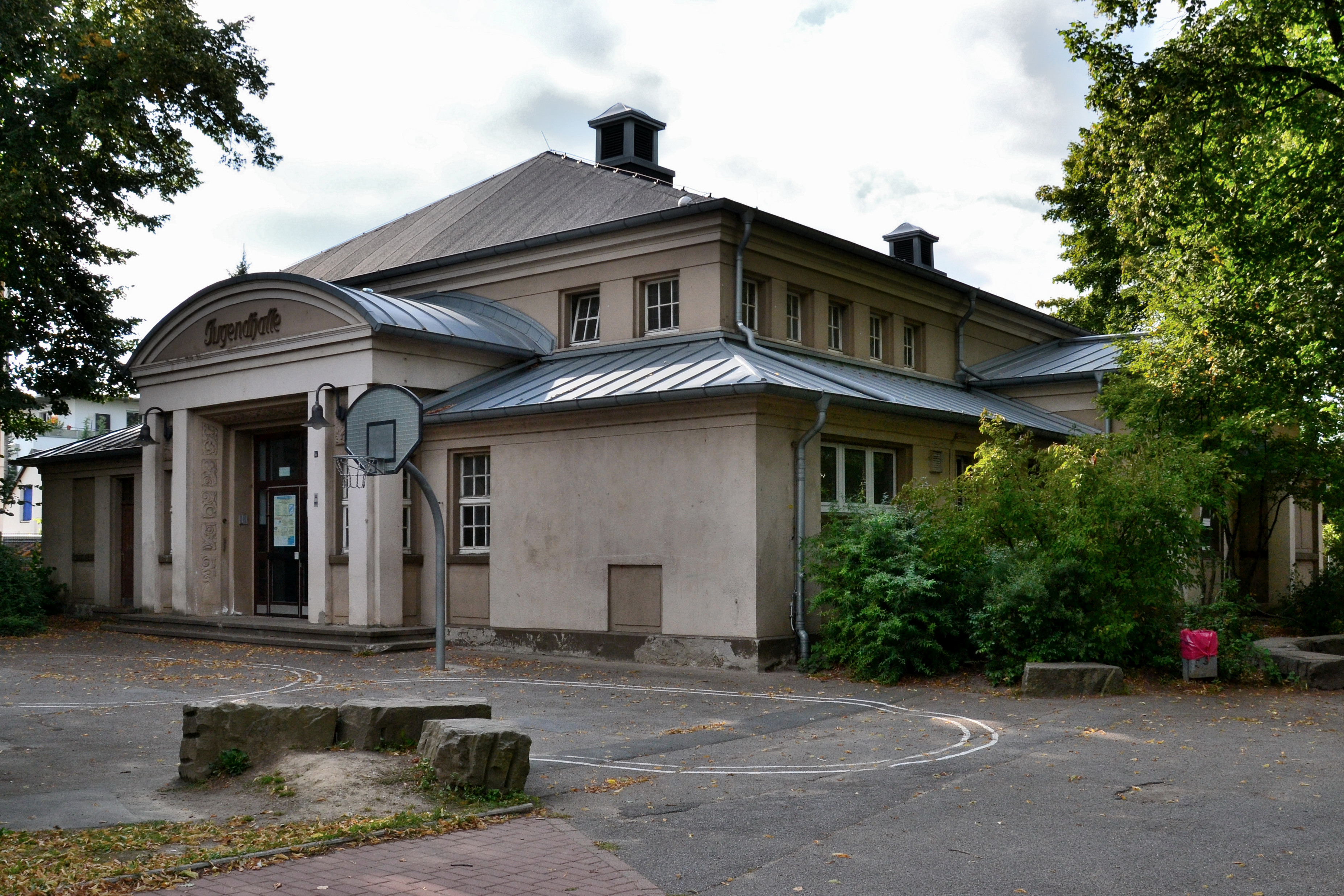 Jugendhalle in Essen-Heisingen, unter Denkmalschutz